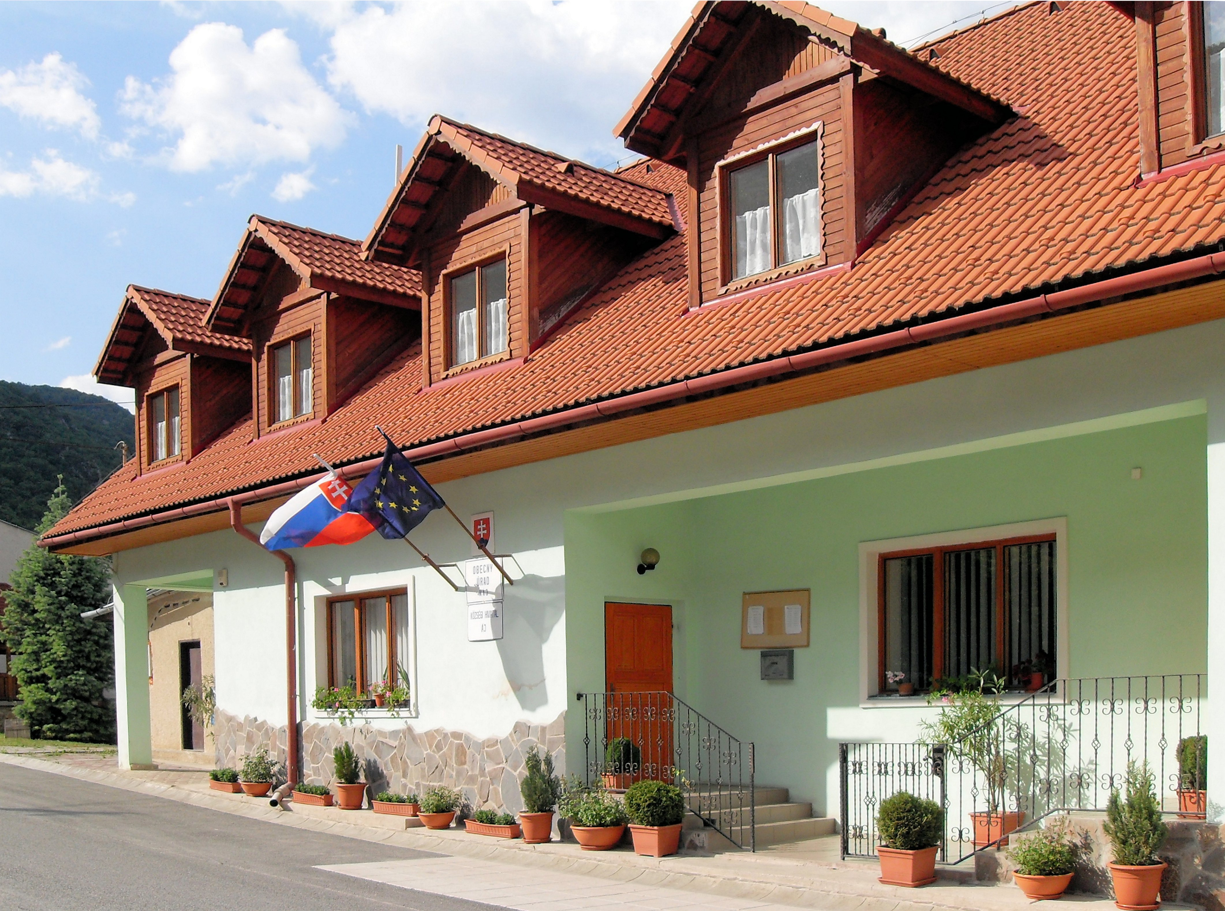 Obecný úrad v Háj